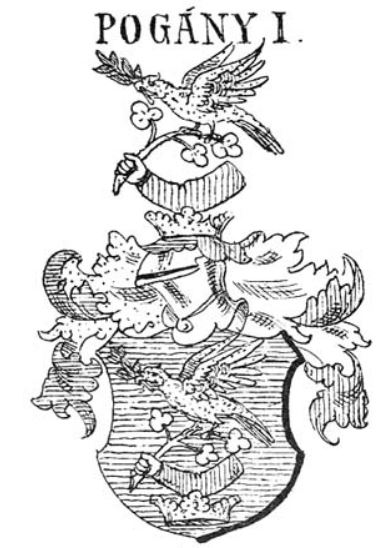 A csébi Pogány család ciemre - Siebmacher könyvéből